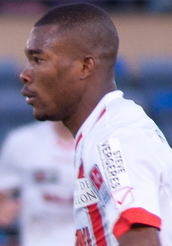 Geoffroy Serey Die - Lausanne vs Sion 02 may 2012